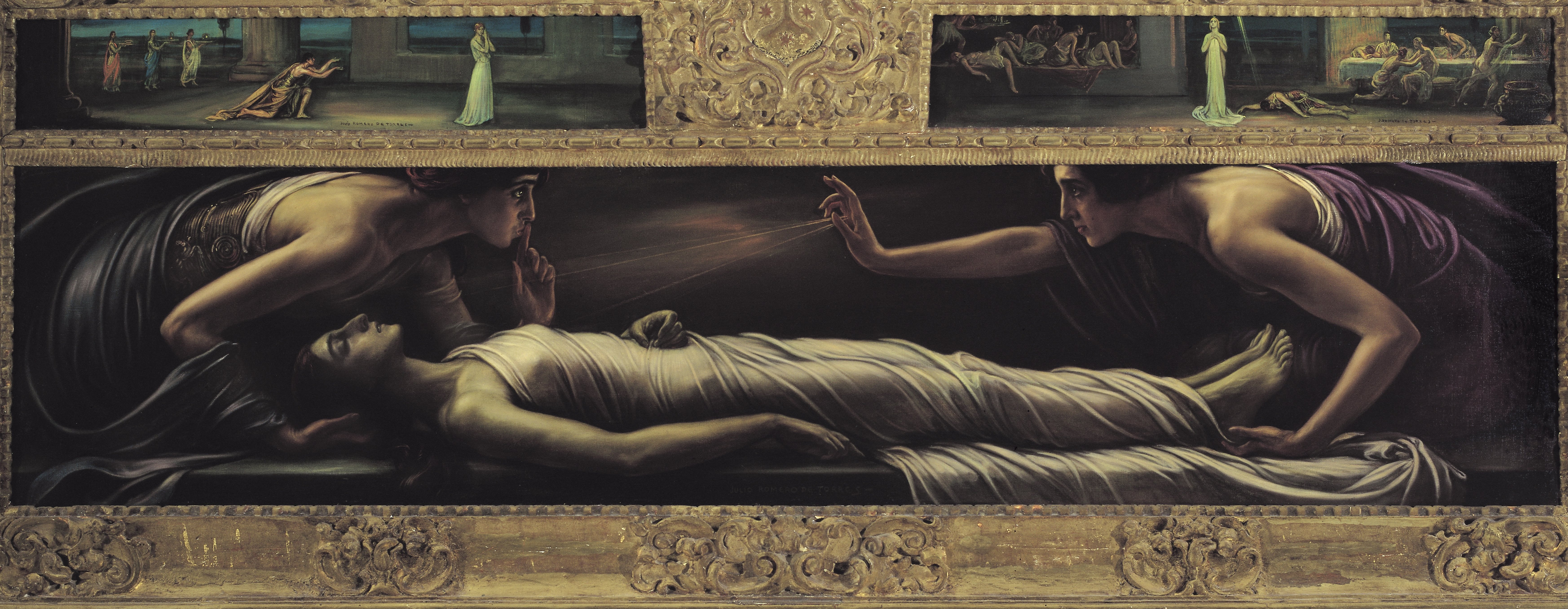 La muerte de Santa Inés. 1920. Óleo y temple sobre lienzo. 152 x 258 cm. Museo Julio Romero de Torres, Córdoba, (España).